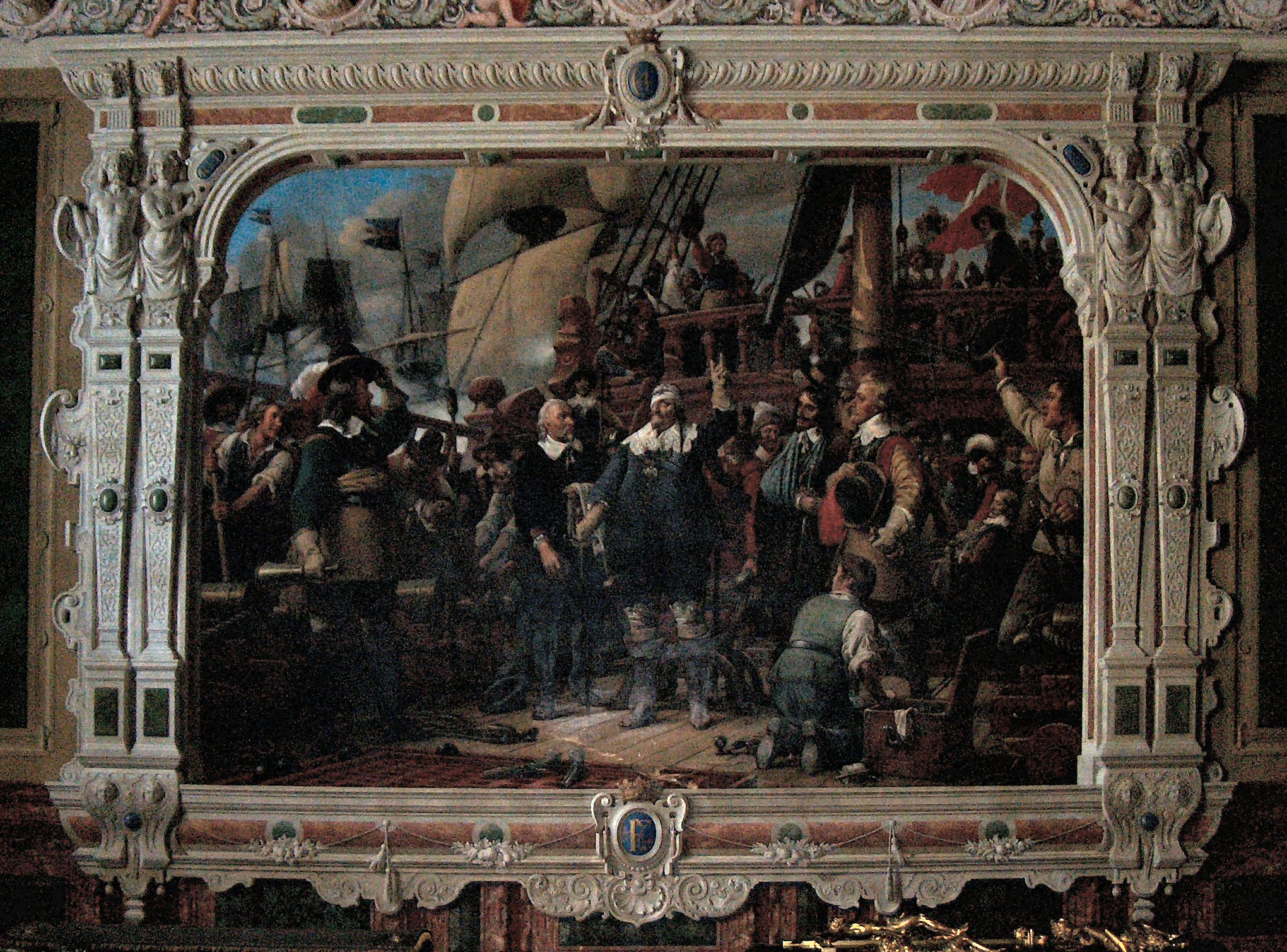 "Christian 4. på Trefoldigheden" i Roskilde Domkirke, Christian 4.s kapel - malet af Wilhelm Marstrand